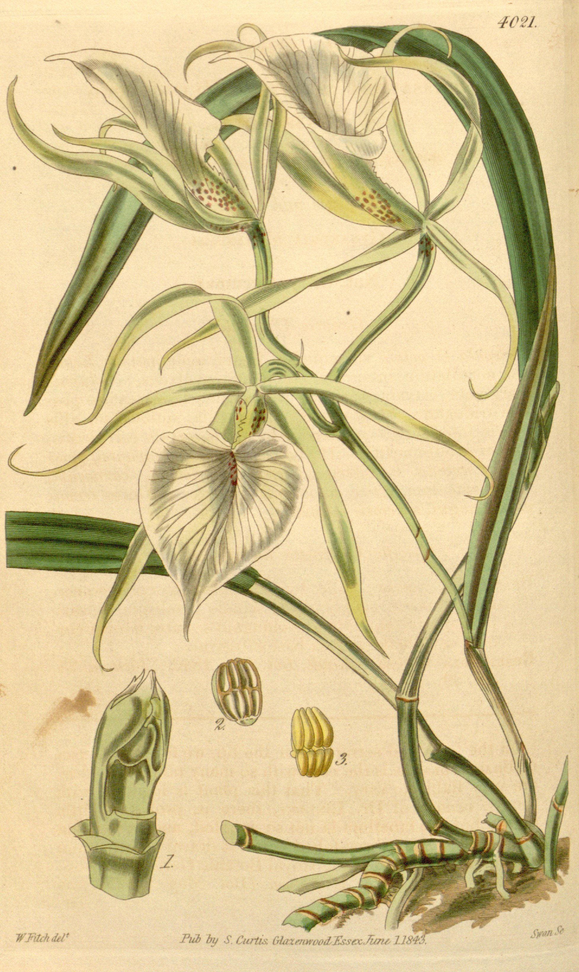 Illustration of Brassavola venosa